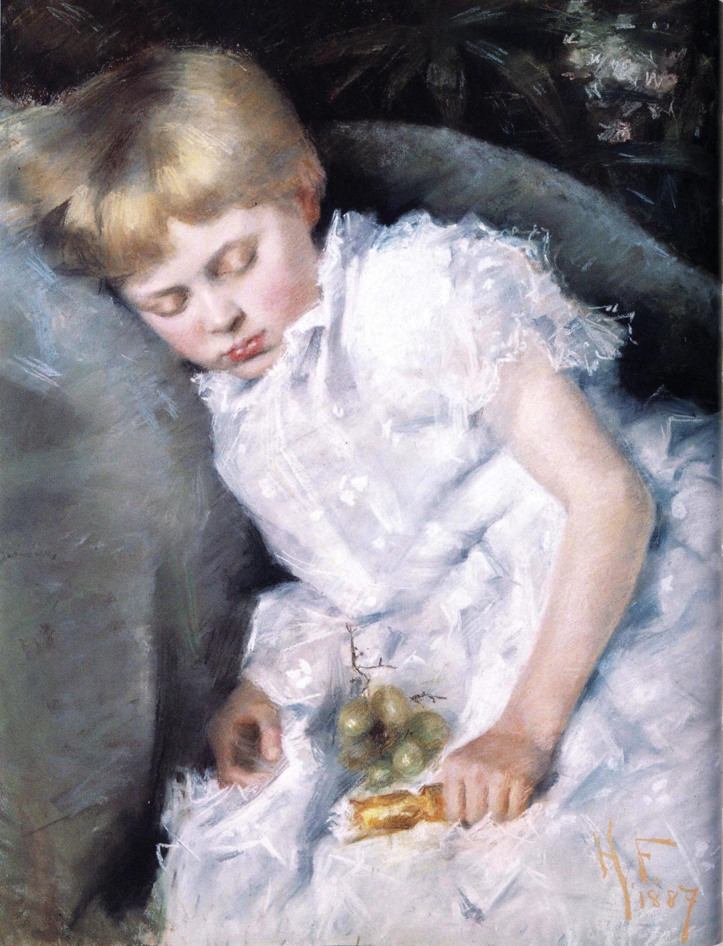 Hanna Frosteruksen maalaus, omistaja Lauri ja Lasse Reitzin säätiö.